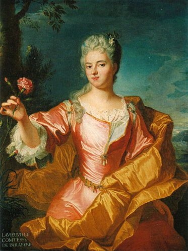 Portrait de Marie-Madeleine de La Vieuville, marquise de Parabère et favorite de Philippe d'Orléans dit le Régent.